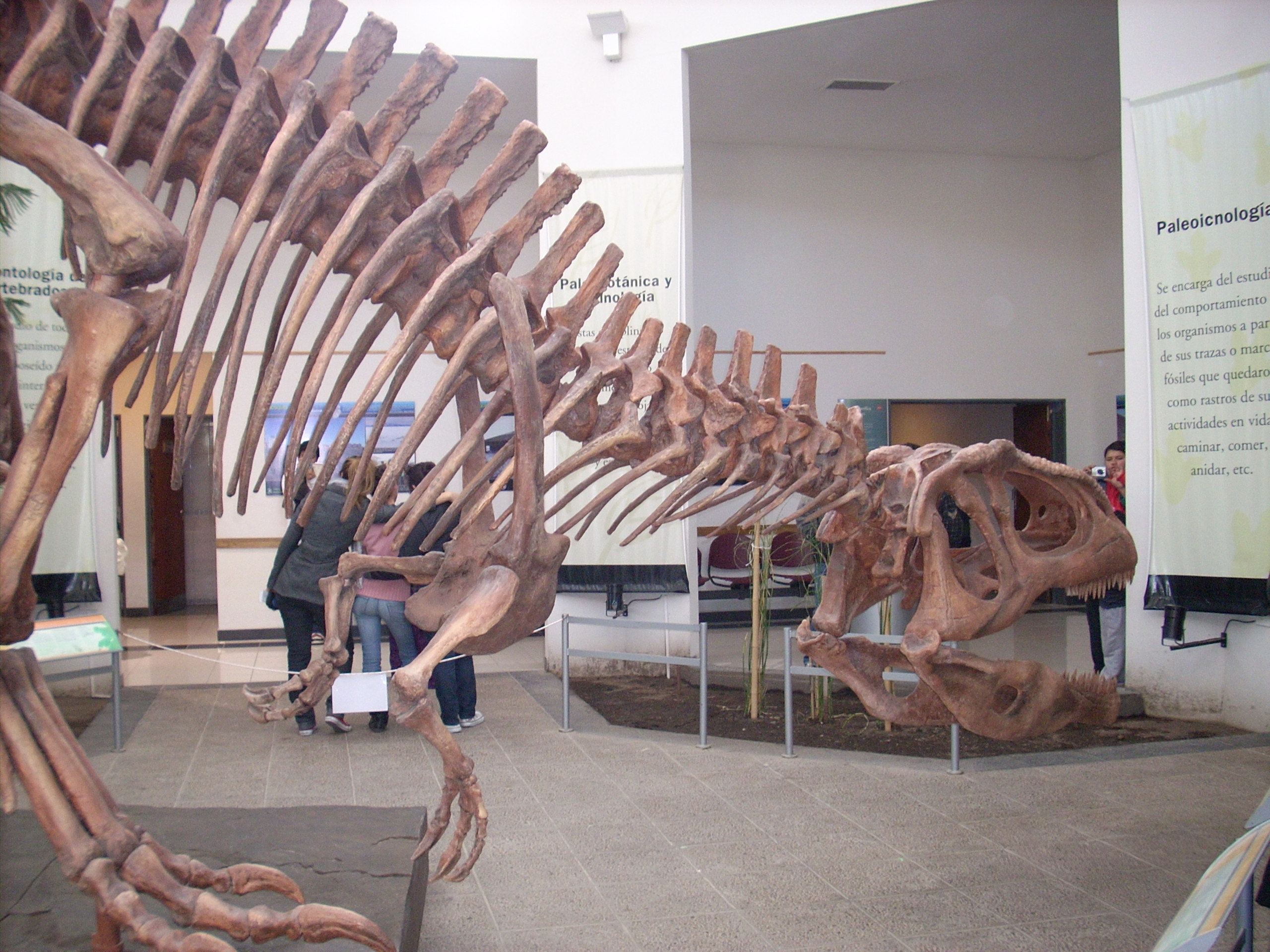 Museo Paleontológico Egidio Feruglio